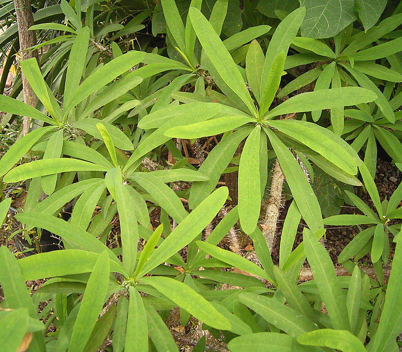 Euphorbia milii var. longifolia BG Heidelberg, Germany